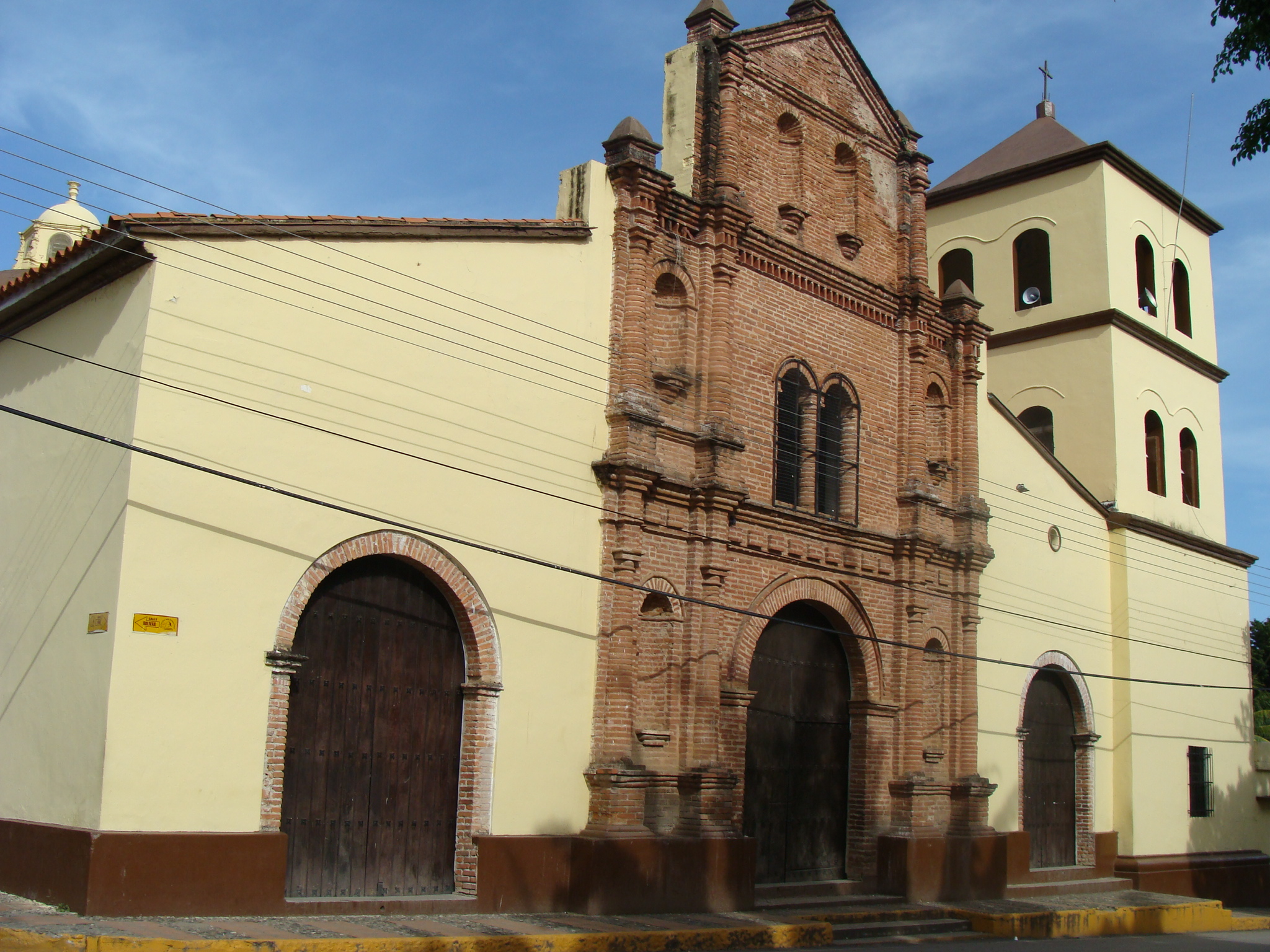 Iglesia de Nuestra Señora del Carmen en San Sebastián de Los Reyes, en el estado Aragua (Venezuela)